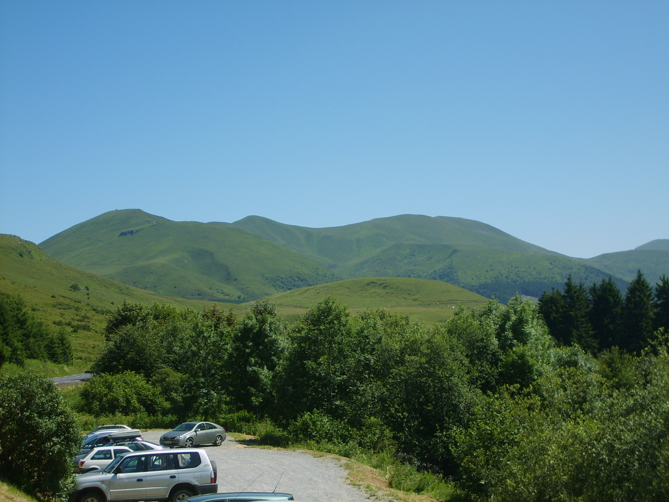 user:Martin253 Vue du puy de la Tache à gauche (1629 m) et du puy de l'Angle à droite (1738 m) dans le massif des monts Dore (Massif central, France). Vue prise depuis les rives du lac de Guéry (1244 m).